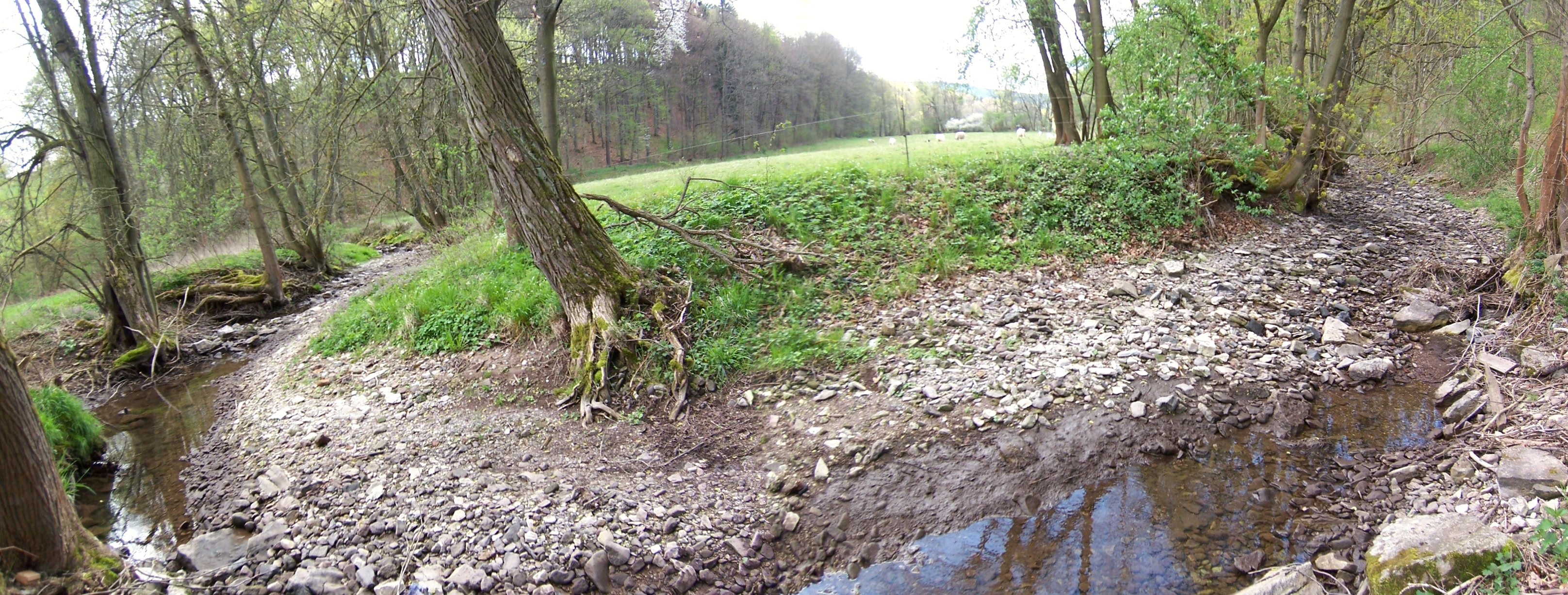 Zahme Gera Versickerung östlich Rippersroda 16.04.2014. Die Zahme Gera versickert in Karstspalten und tritt am Spring von Plaue mit hohem zeitlichen Versatz wieder zu Tage.